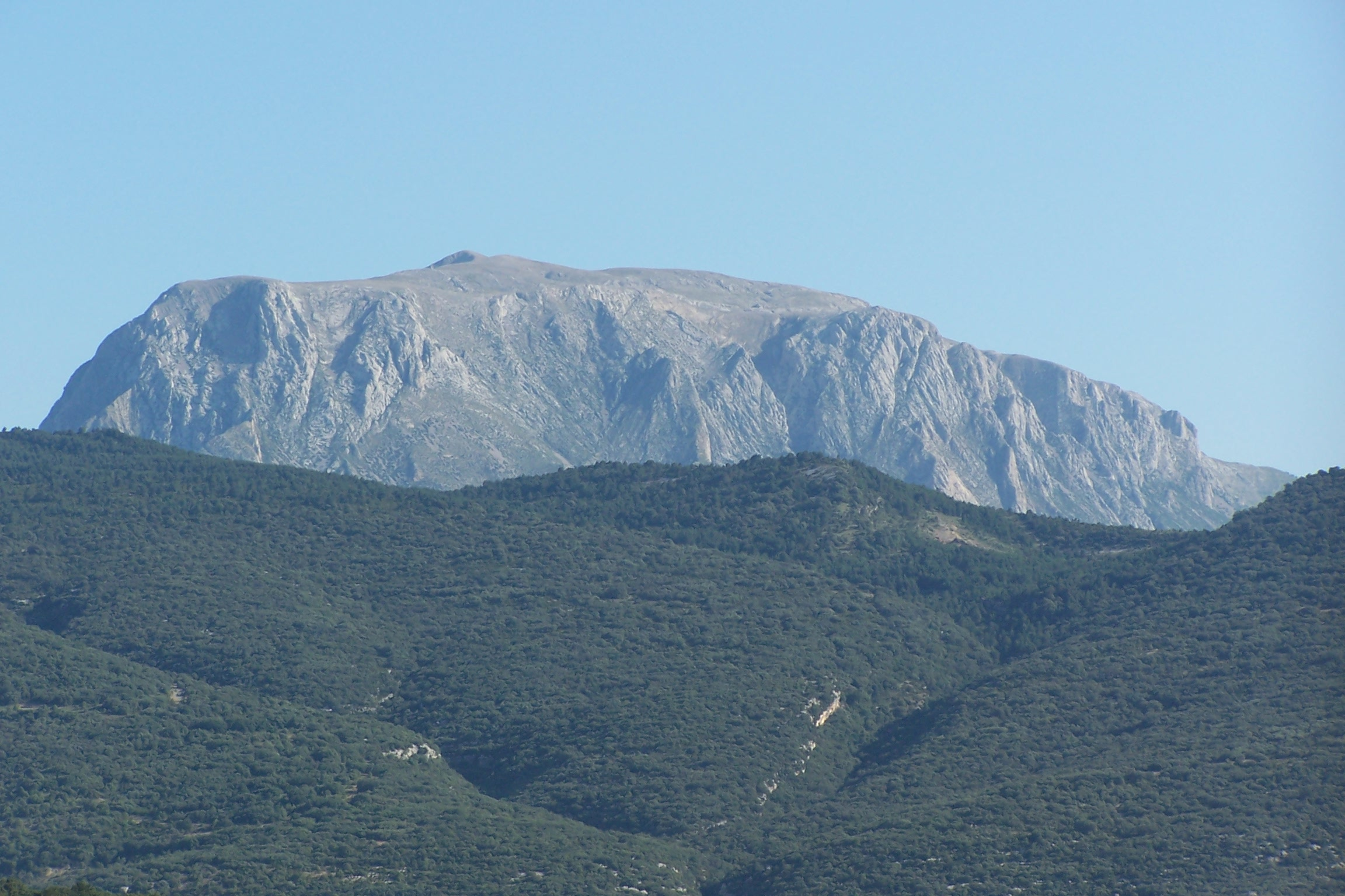 El Turbón.